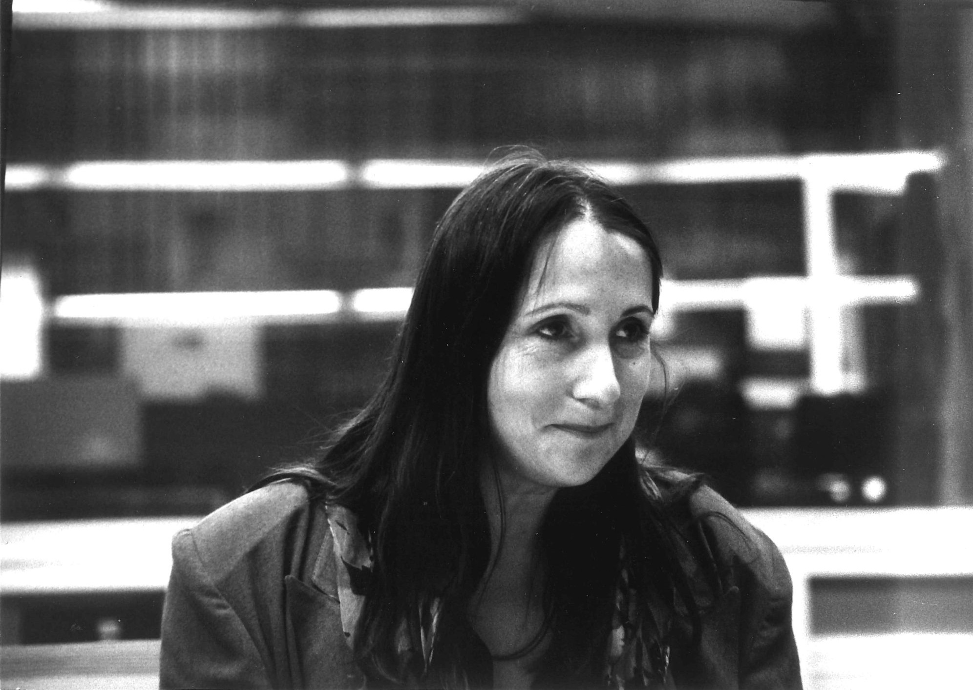 Die Schauspielerin Margit Bendokat bei einer Hörspielproduktion between 1990 and 1995 date QS:P,+1990-00-00T00:00:00Z/8,P1319,+1990-00-00T00:00:00Z/9,P1326,+1995-00-00T00:00:00Z/9 in einer Aufnahme des Berliner Fotografen Werner Bethsold.